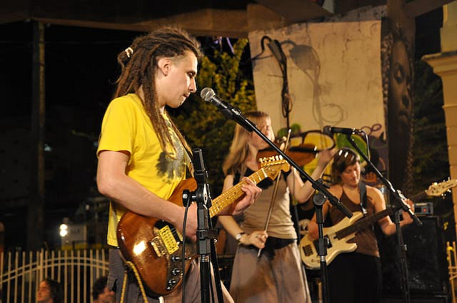 Grupa Hospitāļu iela